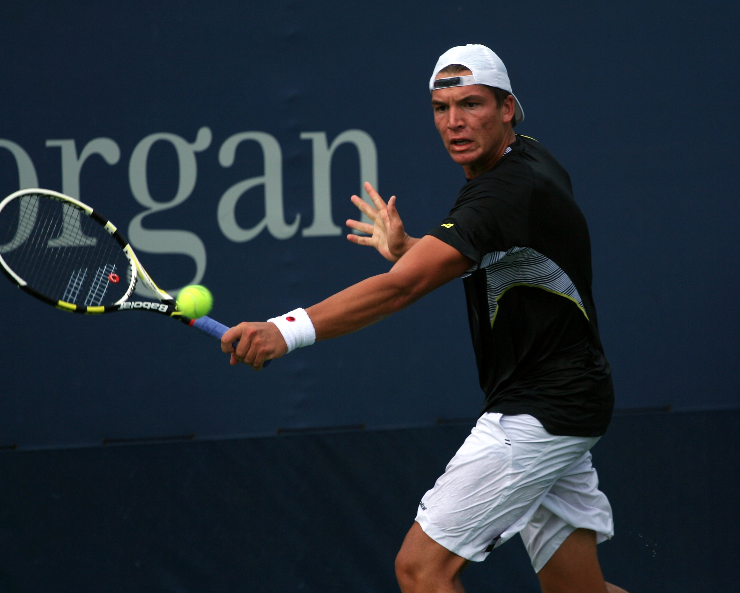 Sunday, Sept. 1, 2013